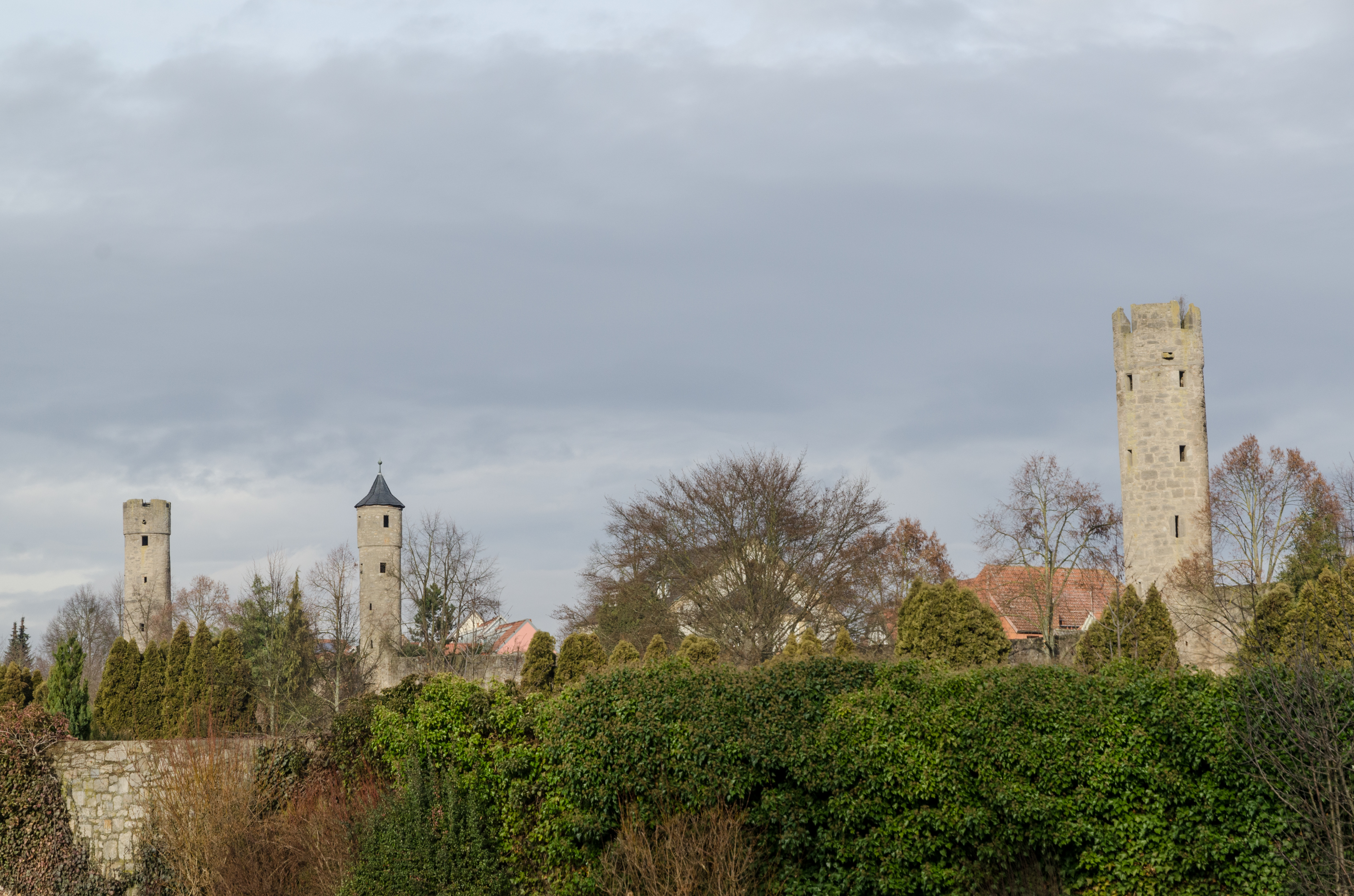 Bad Neustadt an der Saale, Stadtmauer, Bauerngasse 13 bis 37